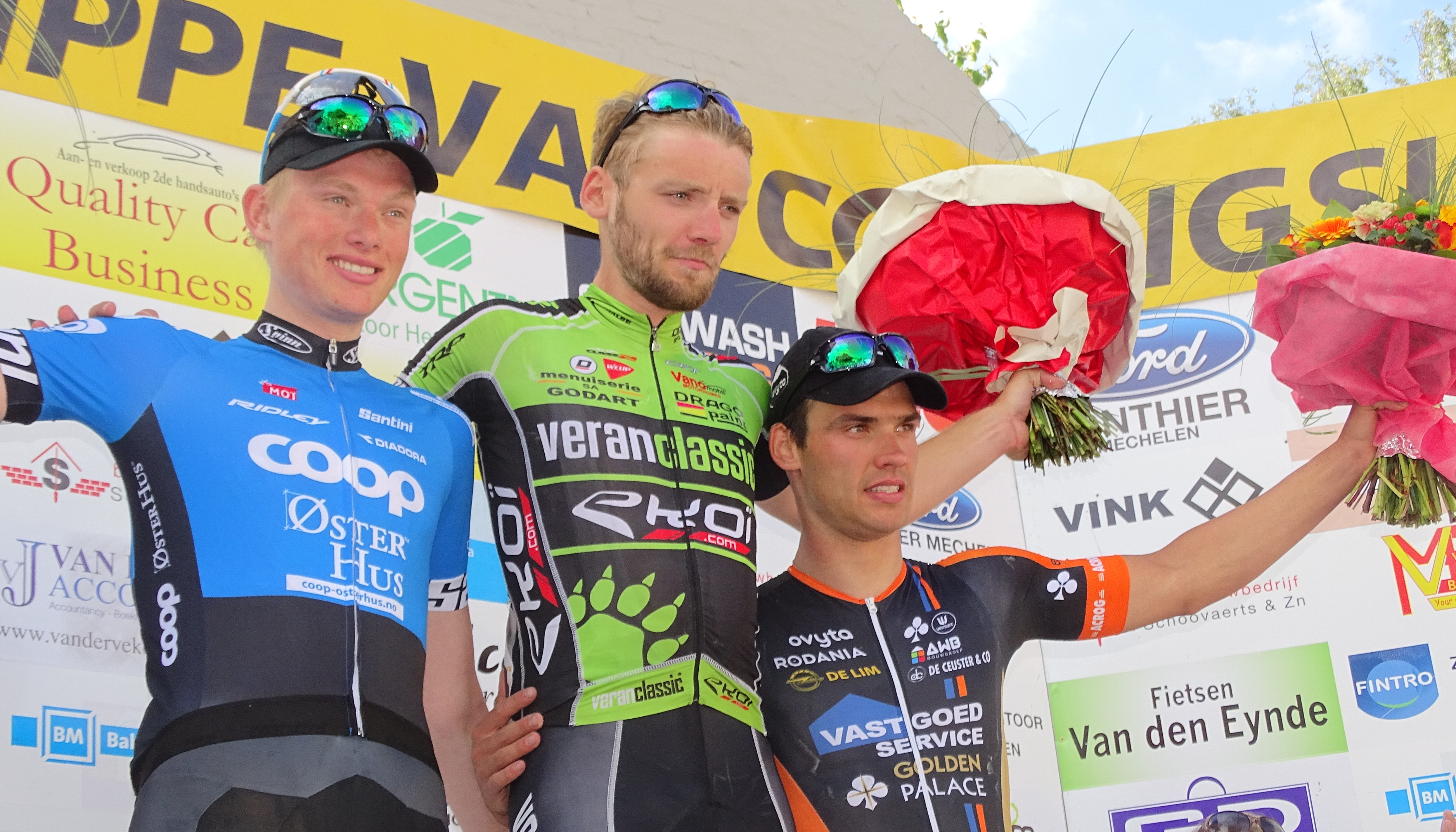 Reportage réalisé le dimanche 7 juin à l'occasion de l'arrivée du Mémorial Philippe Van Coningsloo 2015 à Bonheiden, Belgique.